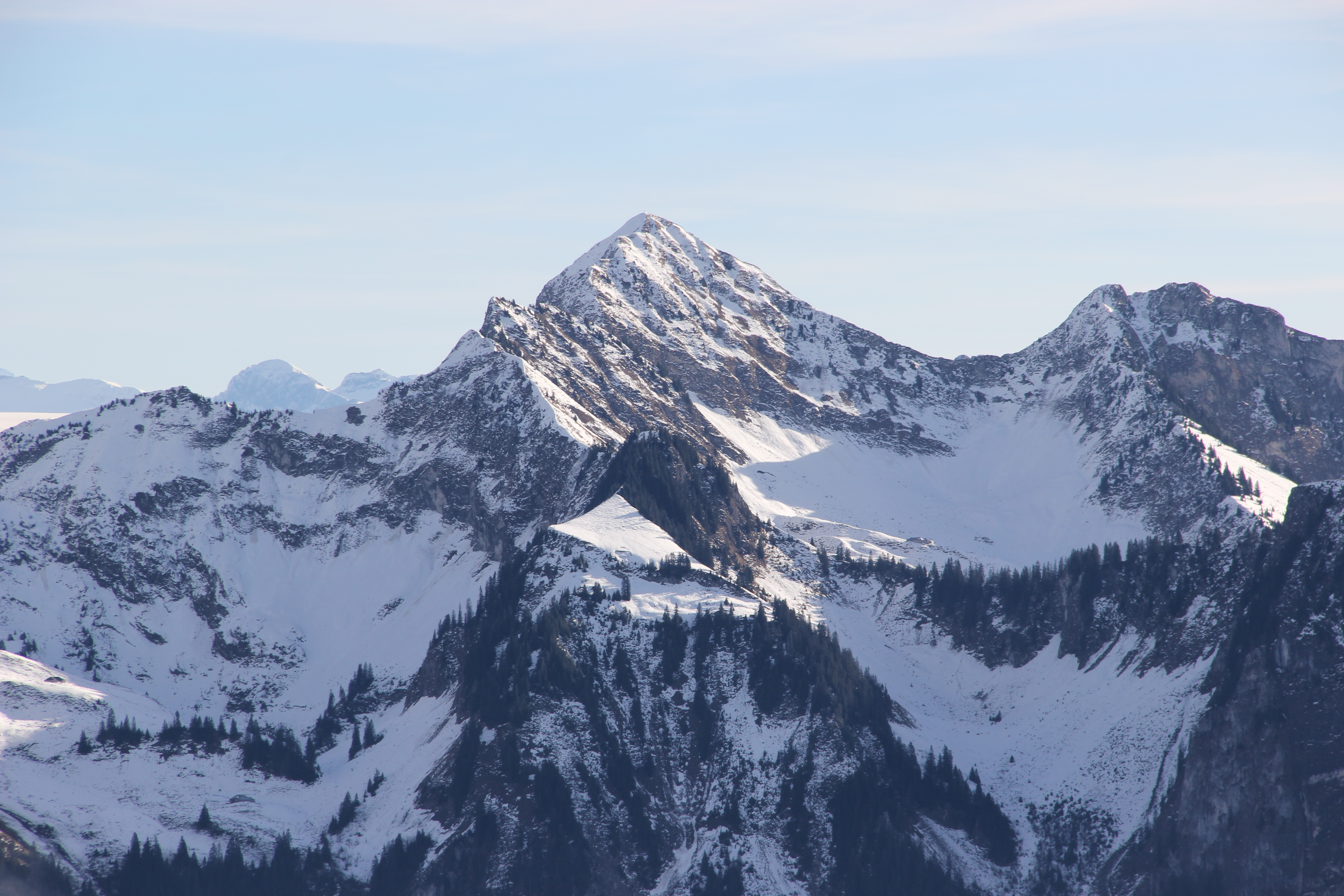 Blick vom La Berra (1719 m) zum Vanil d'Arpille (2085 m)